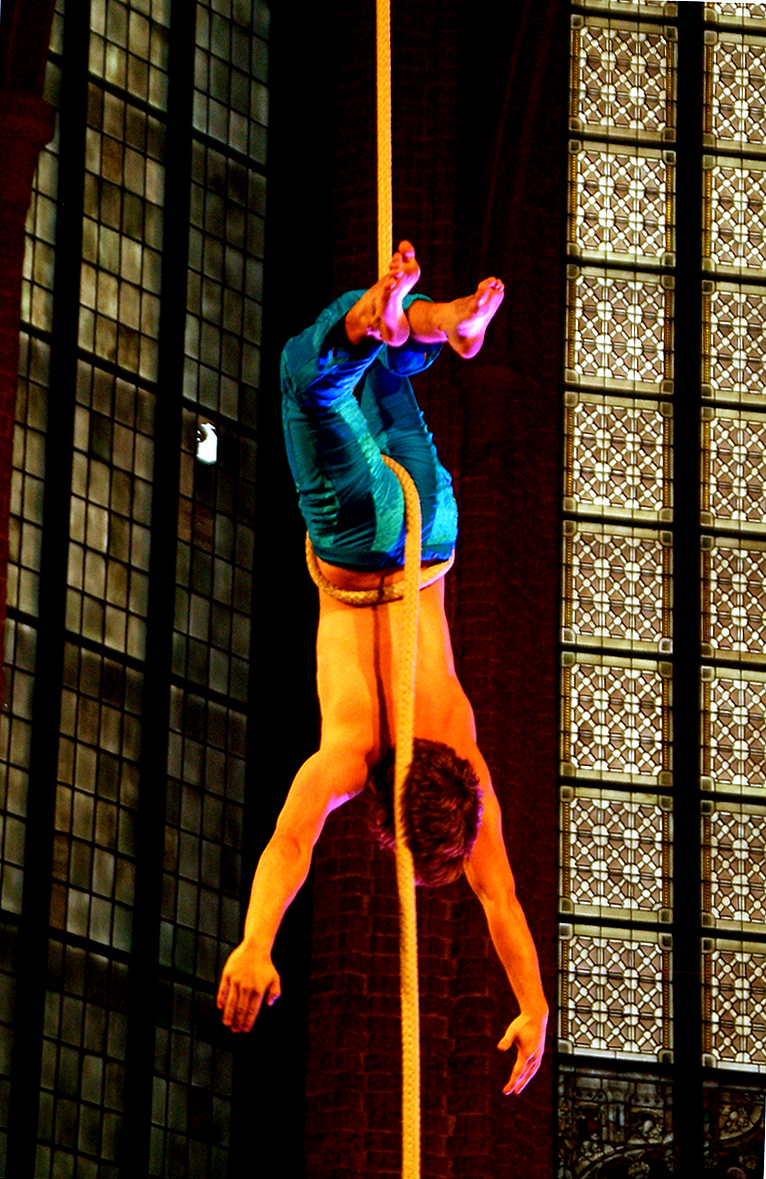 Dieser junge Mann, Akrobat des Kinderzirkus Giovannis, ließ sich 2012 anfangs solo kopfüber und freihändig am Seil herabhängen in der Marktkirche von Hannover. Anlaß war die 6. Lange Nacht der Kirchen ...